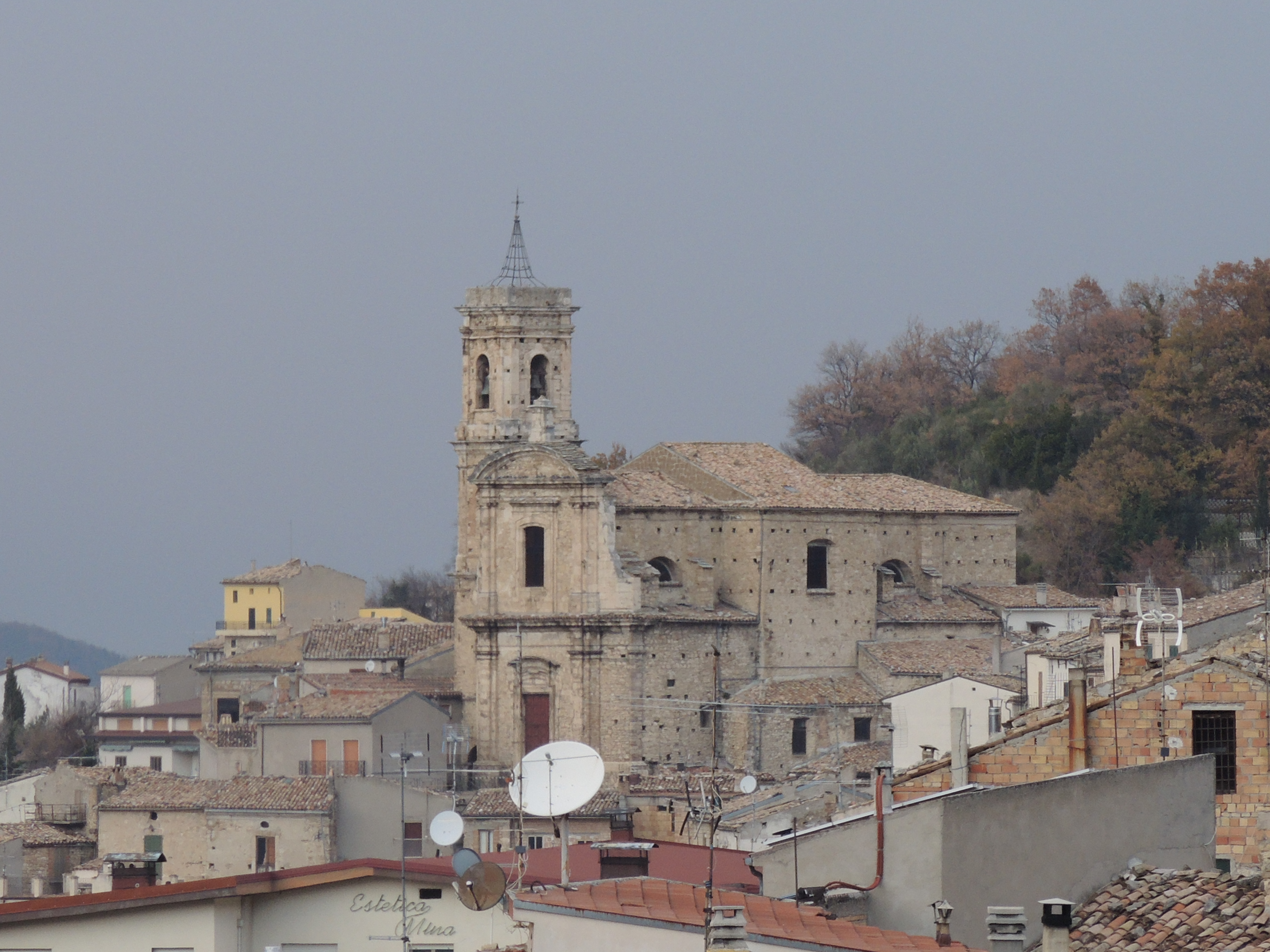 Bomba: Chiesa di Santa Maria del Popolo